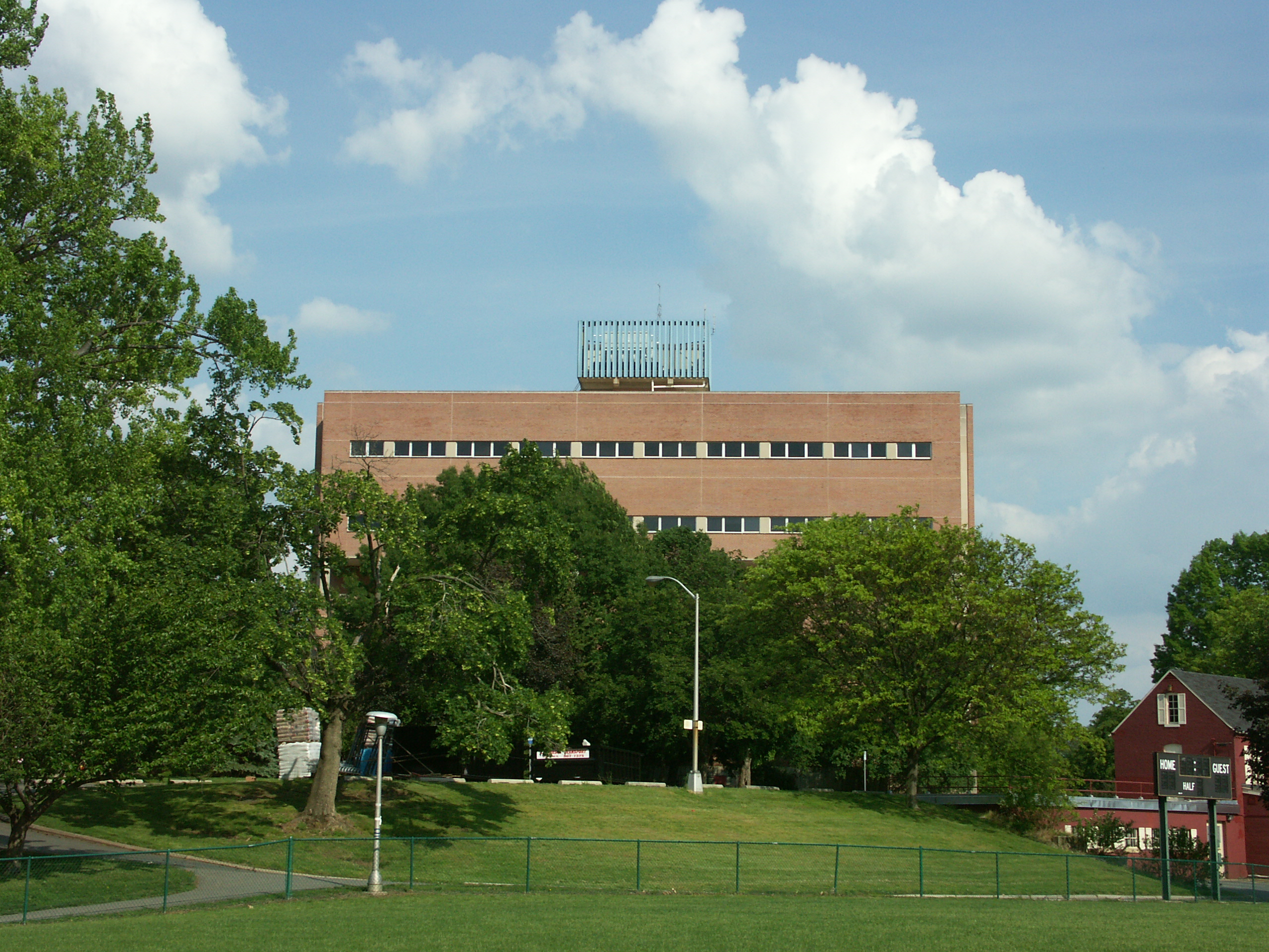 Ganser Library at Millersville University of Pennsylvania in Millersville, Pennsylvania